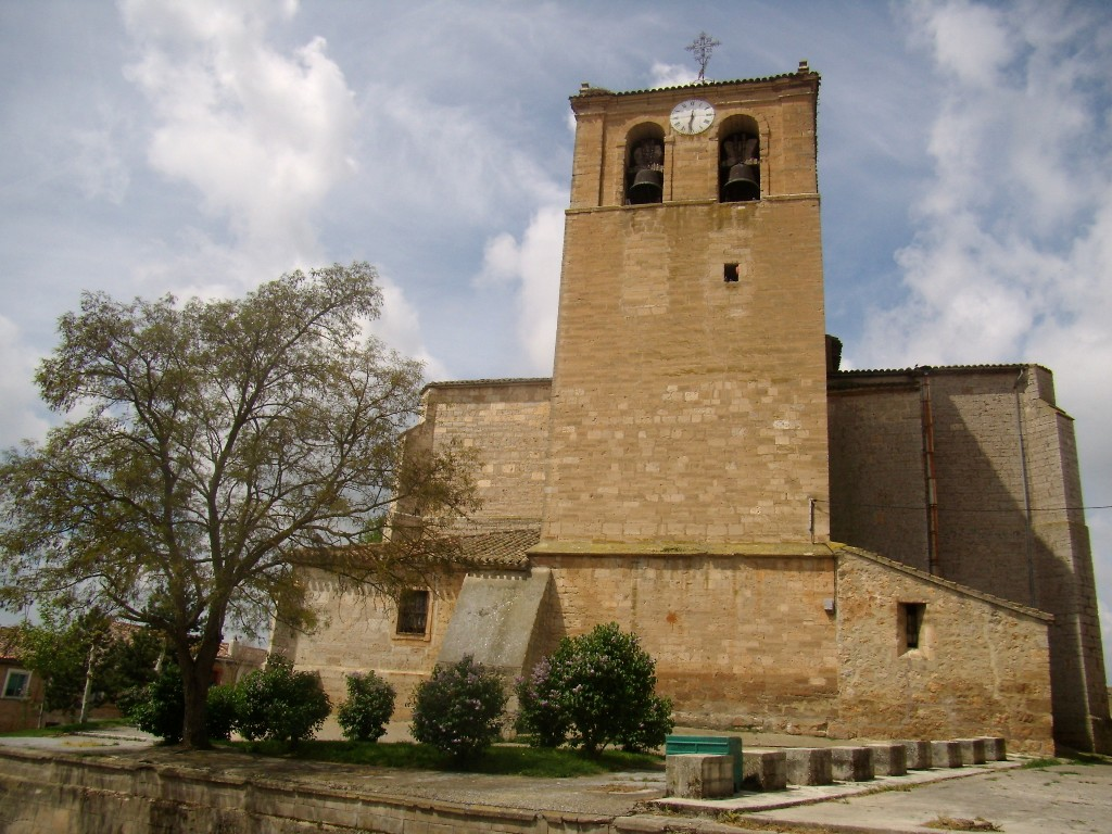 En 1622 Gabriel del Cotero, titulándose “maestro arquitecto” declaraba tener a su cargo la obra de cantería de la iglesia de La Asunción en Tardajos (Burgos) por cesión que en él había hecho un año antes Juan de Naveda, autor de la traza y condiciones.